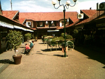 Ciudad de Monte Grande, Buenos Aires, Argentina. Galería sobre calle Alem.